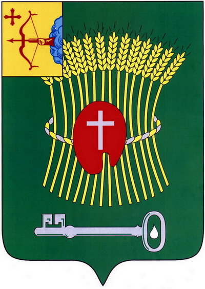 Вариант герба Богородского района Кировской области в изменённых цветах